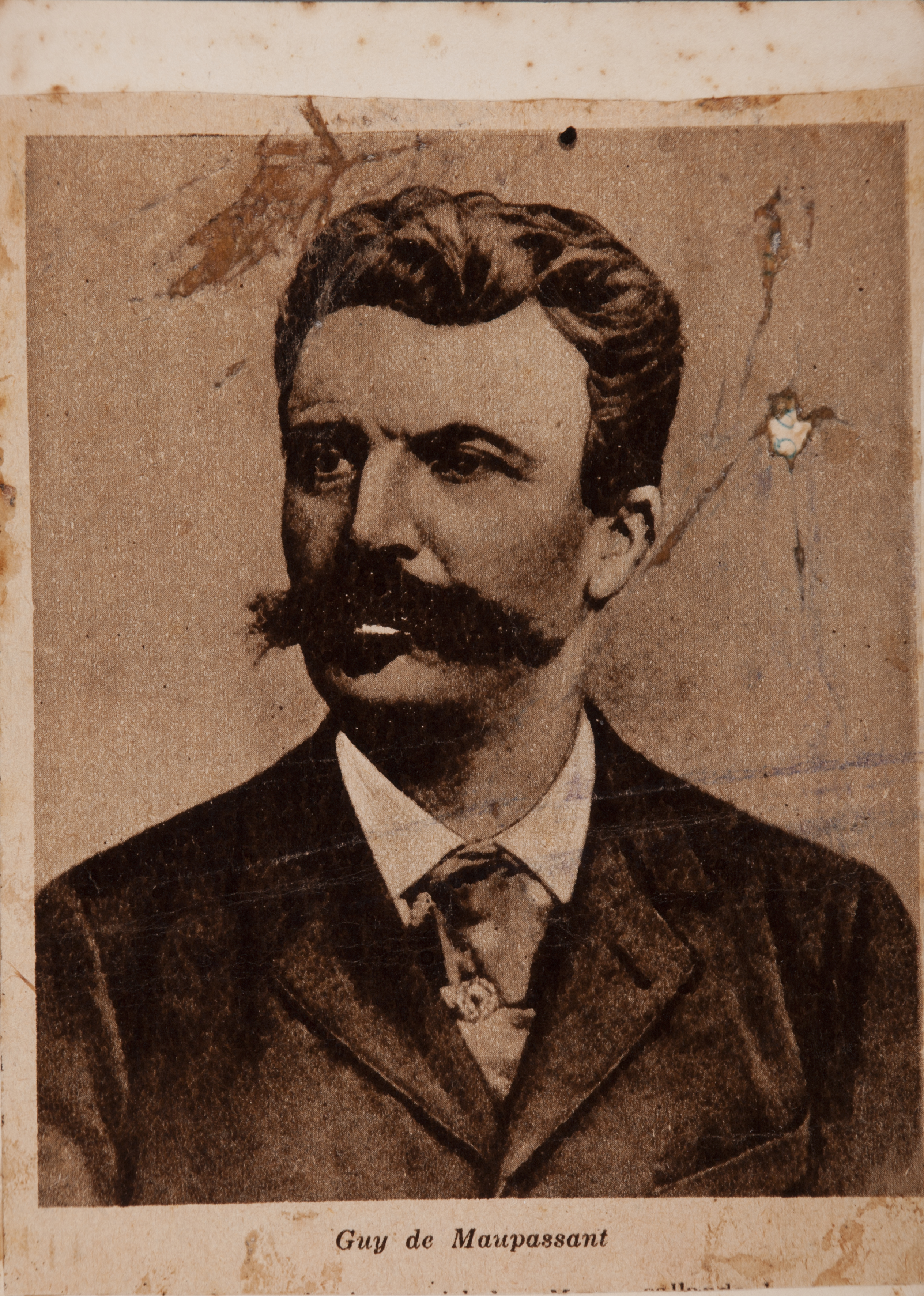 Obra que integra o acervo do Museu Paulista da USP. Coleção João Baptista de Campos Aguirra.